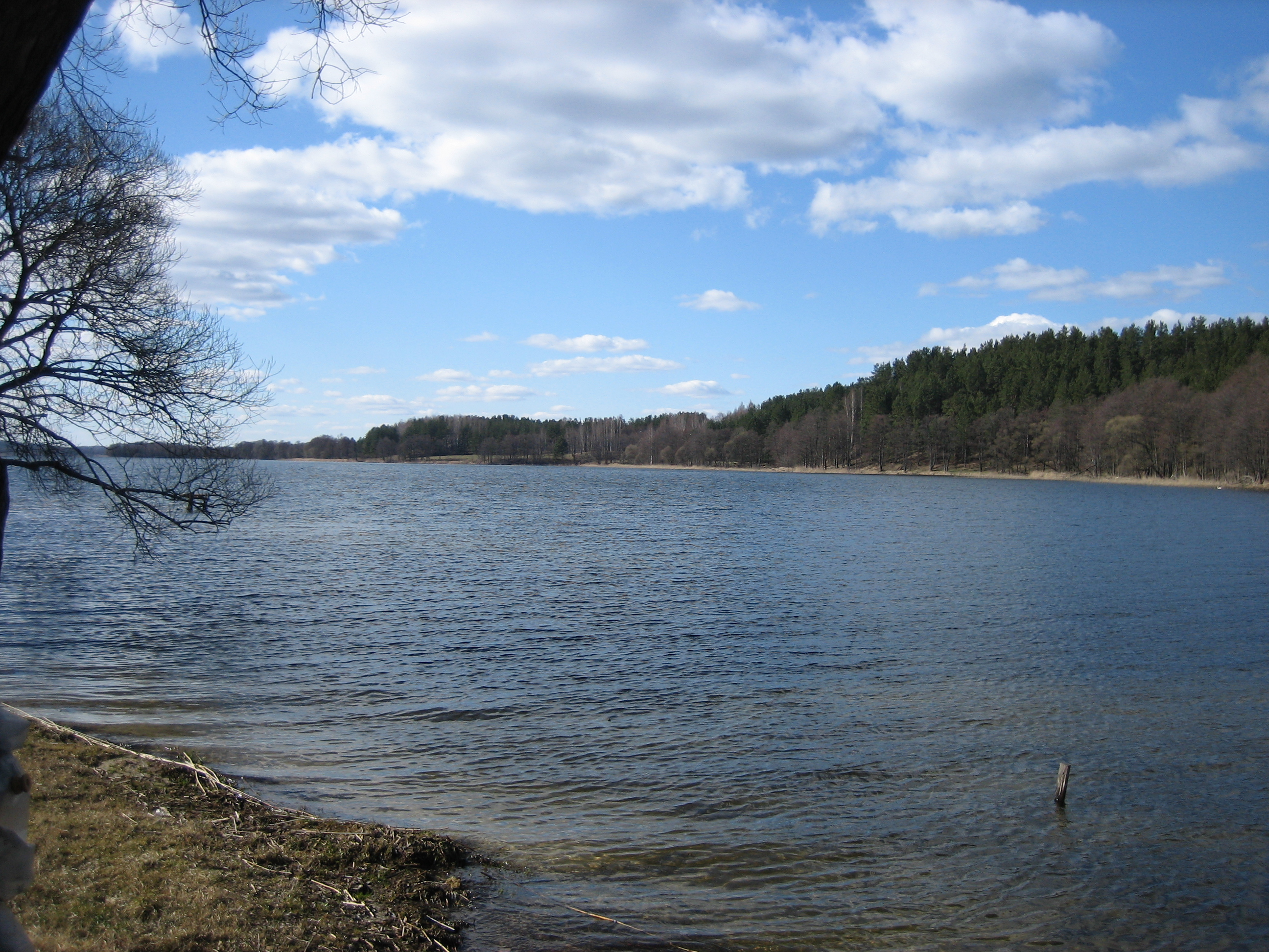 Lūšių ežeras